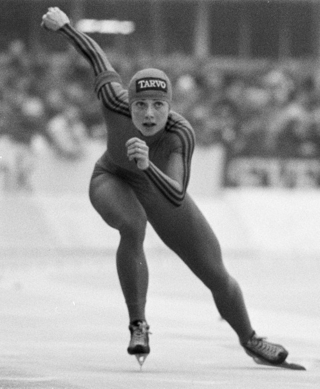 Ria Visser